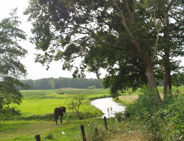 Drentse Aa, river